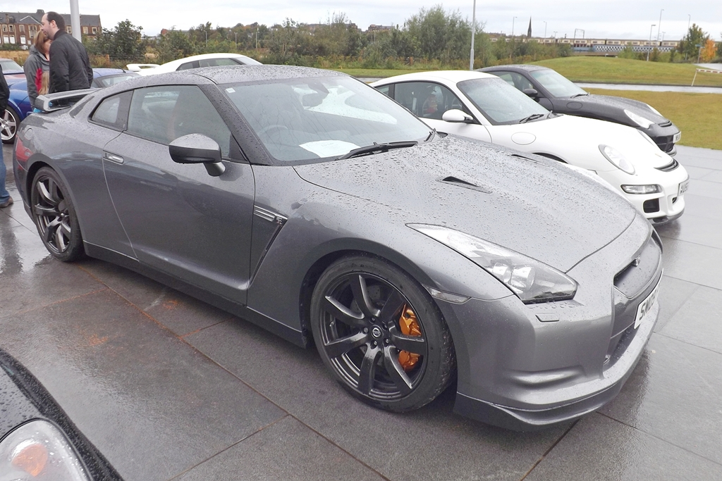 Nissan GT-R